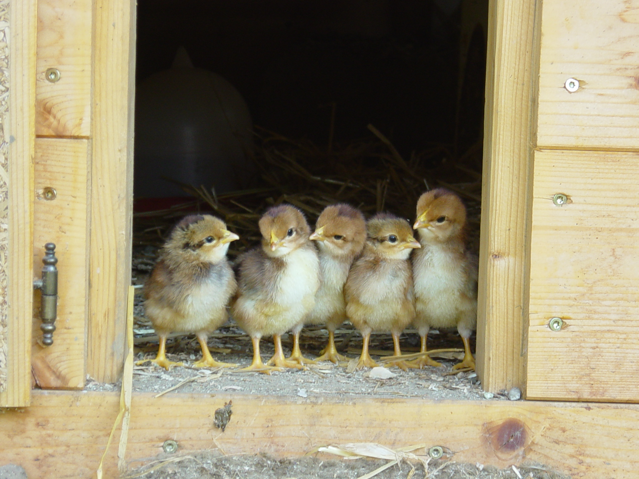 Küken vor dem ersten Ausflug